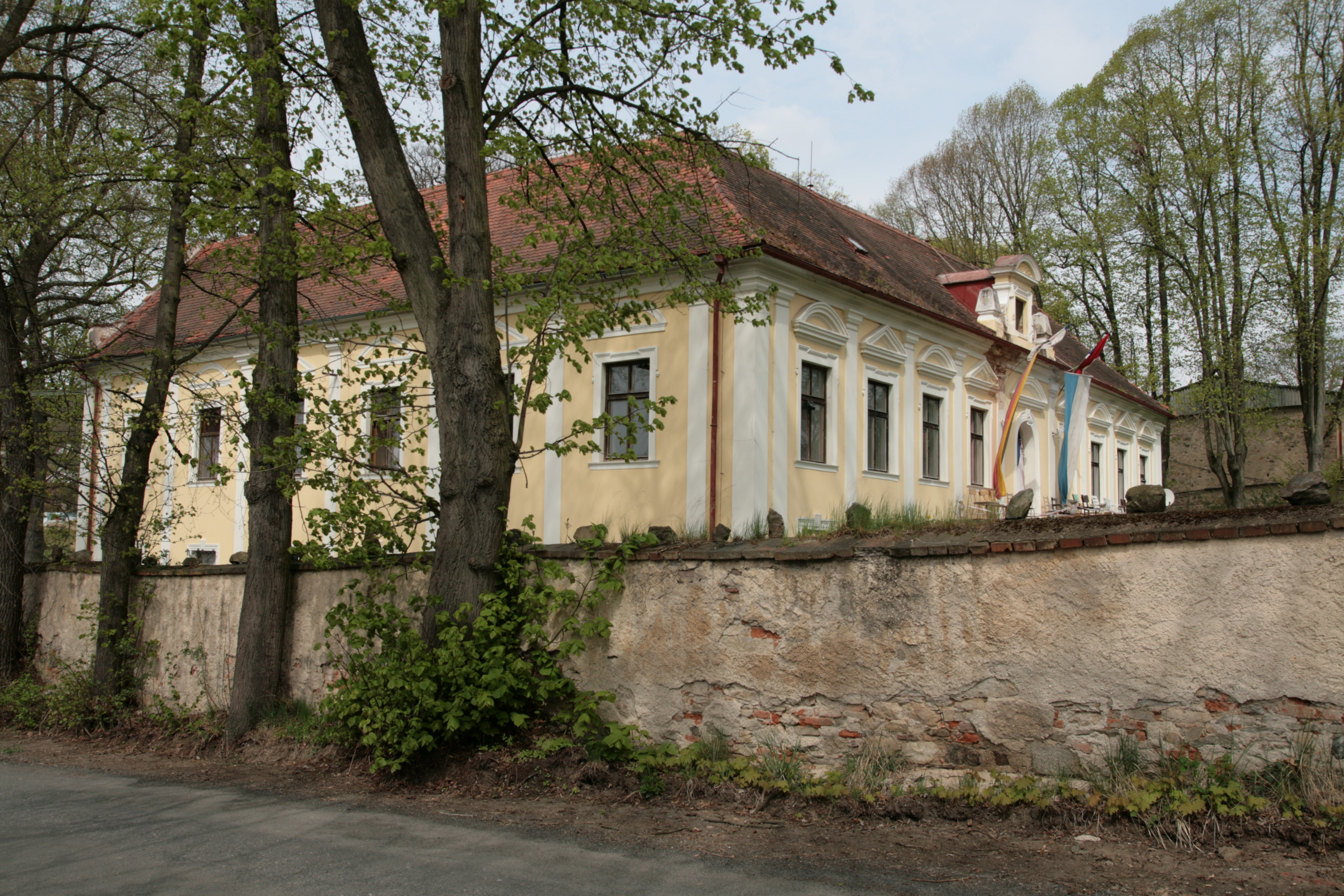 Vesnice Otín, část města Klatovy. Zámek s oborou.